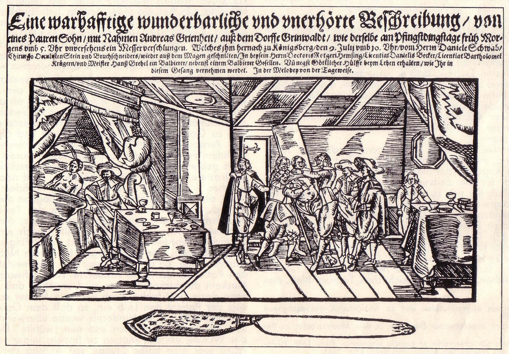 Nachsorge des Knechts Andreas Grünheide, der ein Messer verschluckt hatte und von Daniel Schwabe in Königsberg i. Pr. der weltweit ersten Magenöffnung unterzogen worden war.